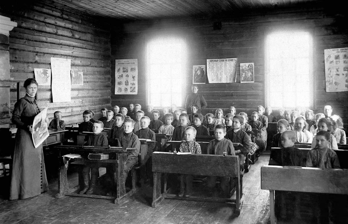 Земская школа. Урок ведет Серафима Александровна Мышкина